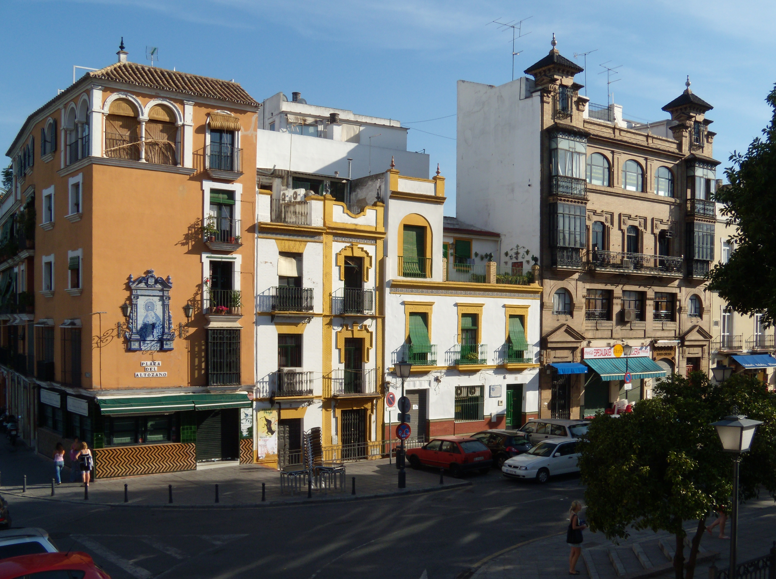 La Plaza del Altozano de Sevilla, en el barrio de Triana